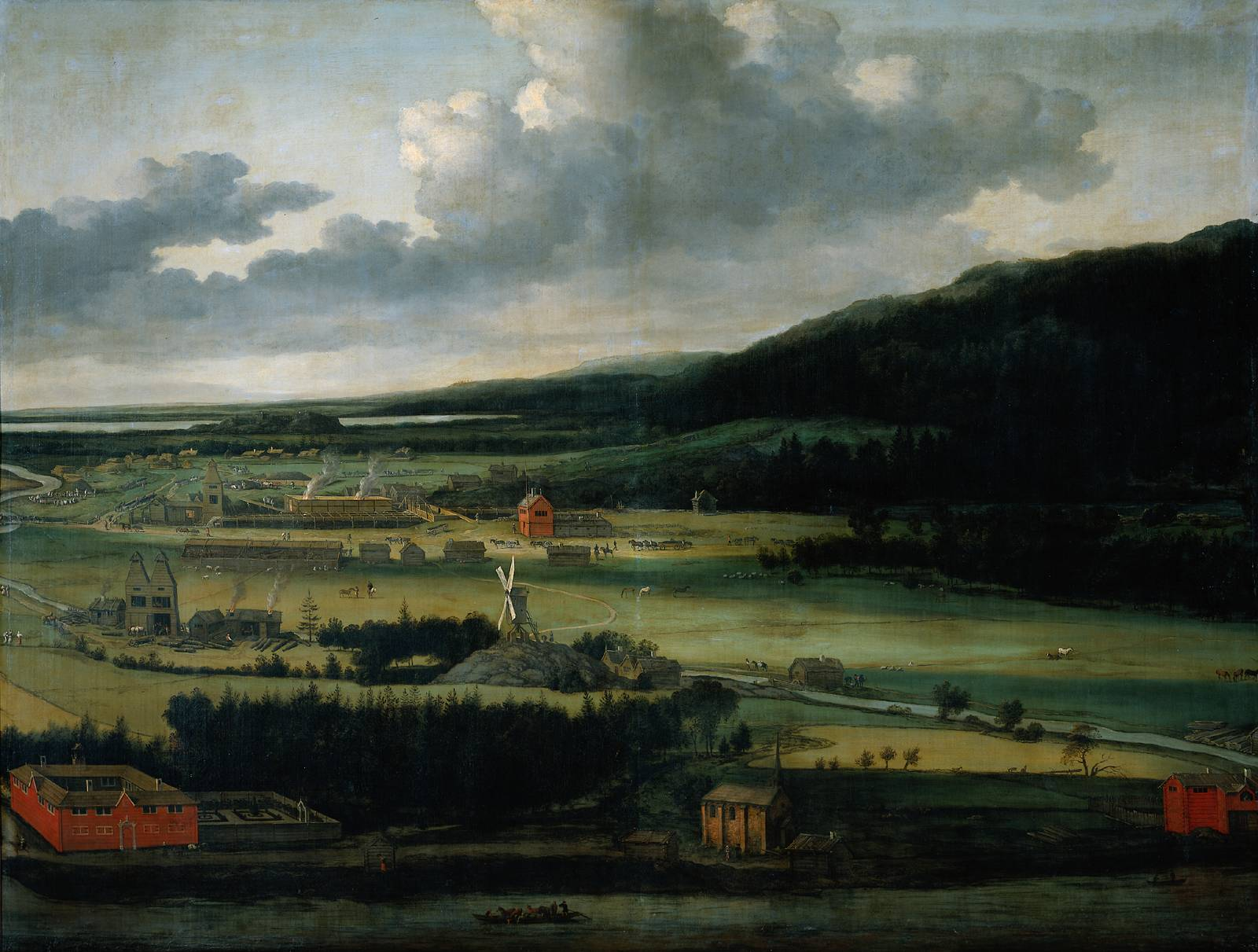 Julitabroeck, Södermanland, Sweden